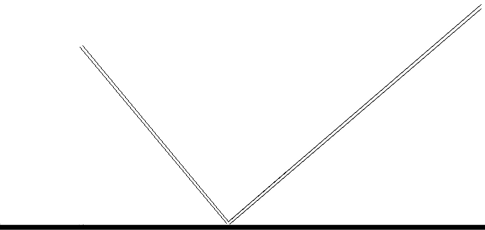 Odrazí